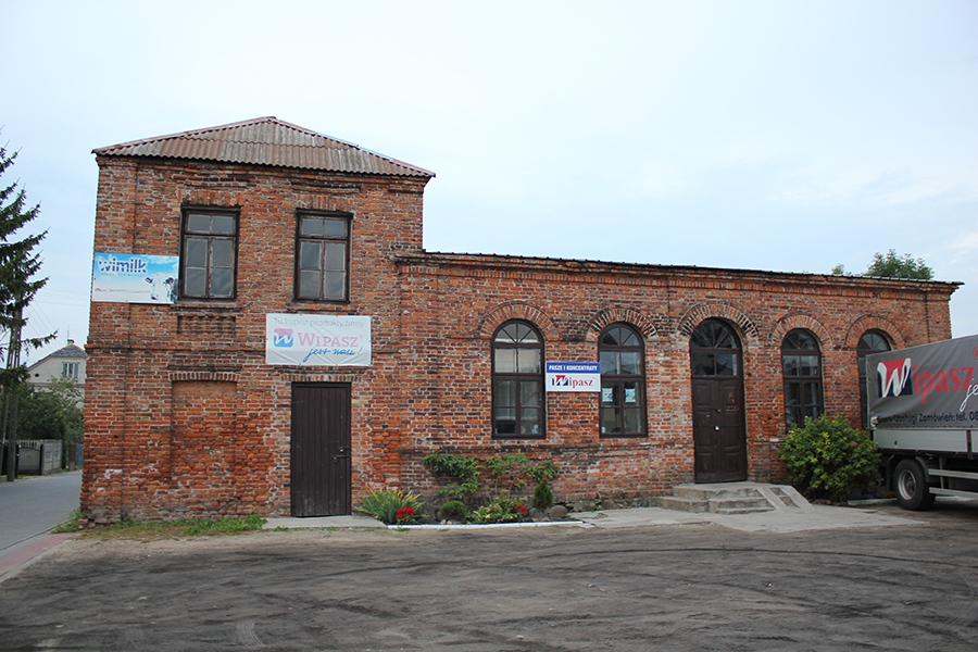 Czyżew, ul. Piwna / ul. Polna - pierwotnie synagoga, obecnie magazyn, 4 ćw. XIX